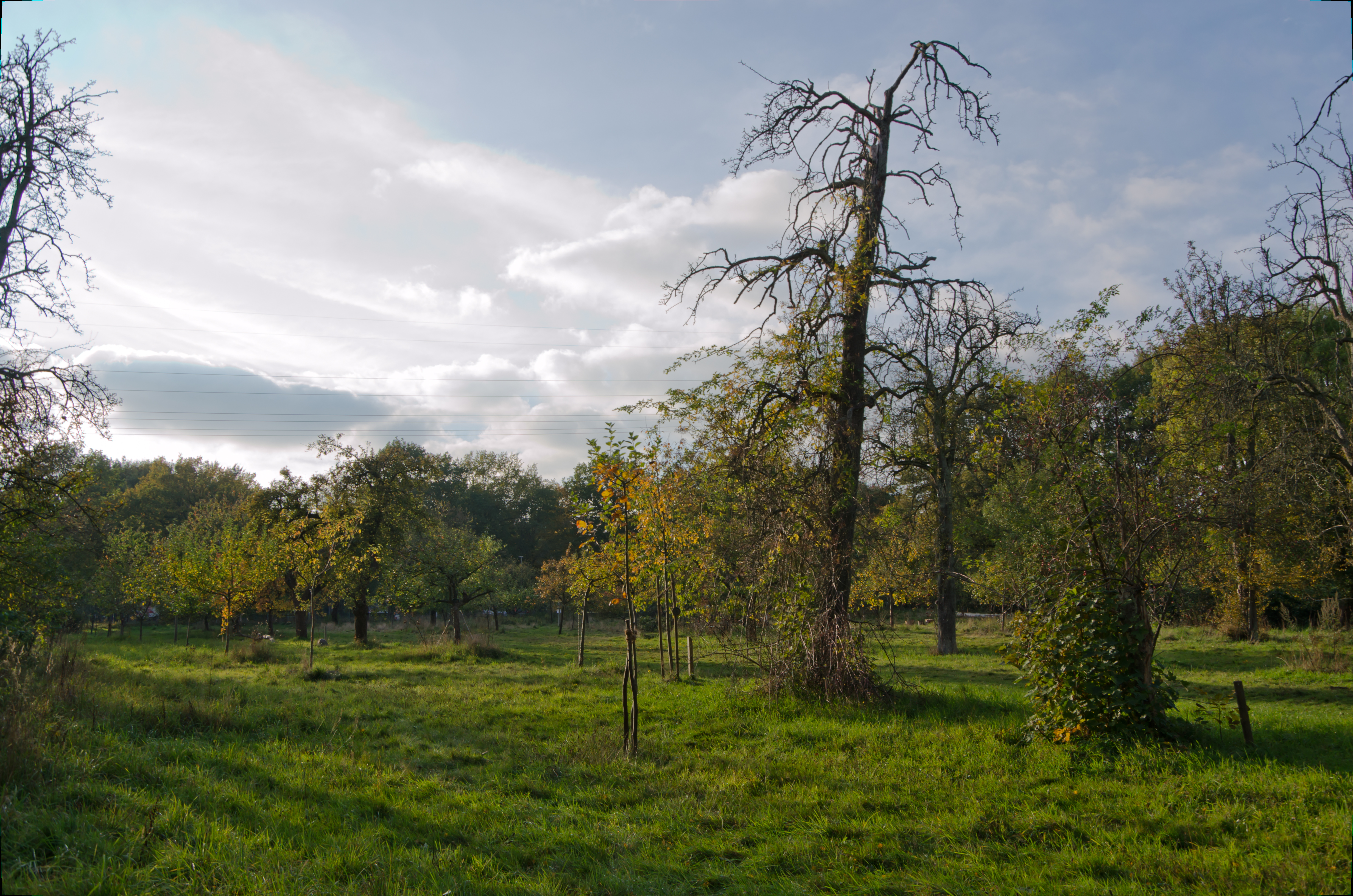 Hamburg Gut Karlshöhe Streuobstwiese im Herbst